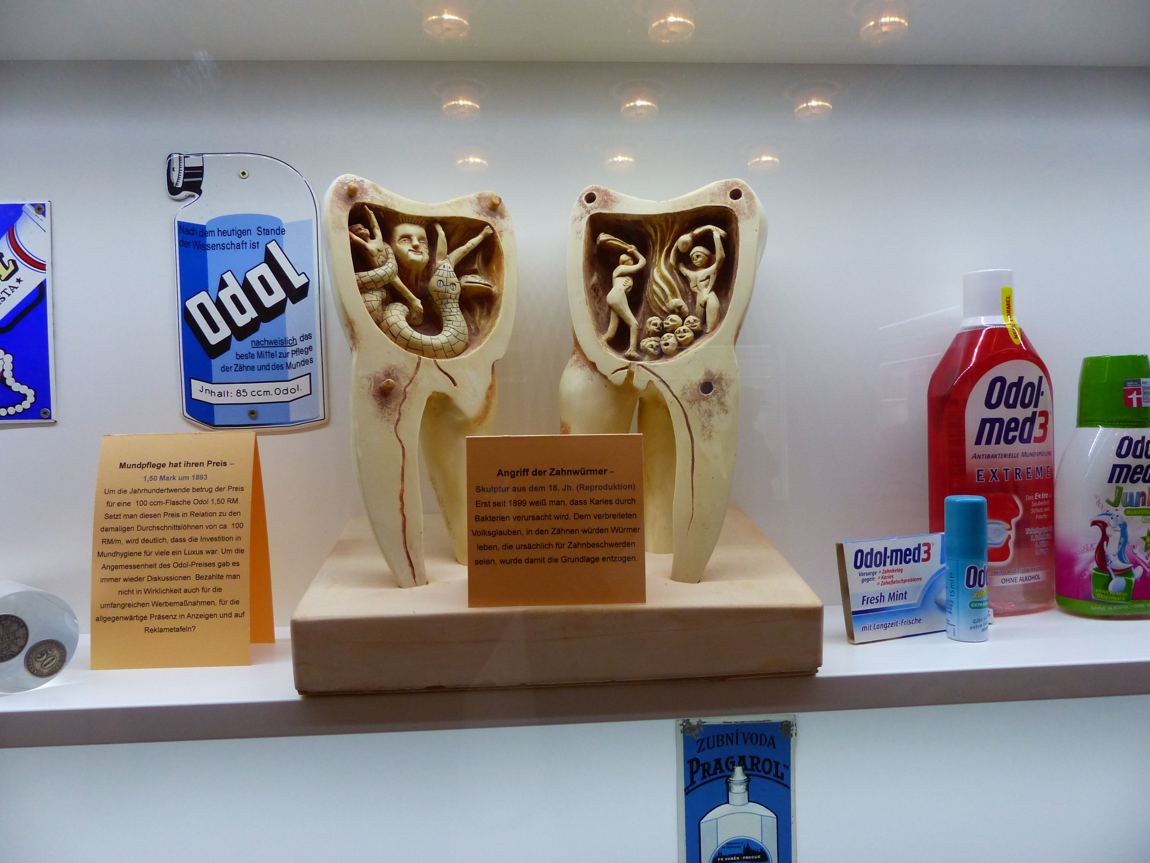 Lingnerschloss, Dresden, Sachsen